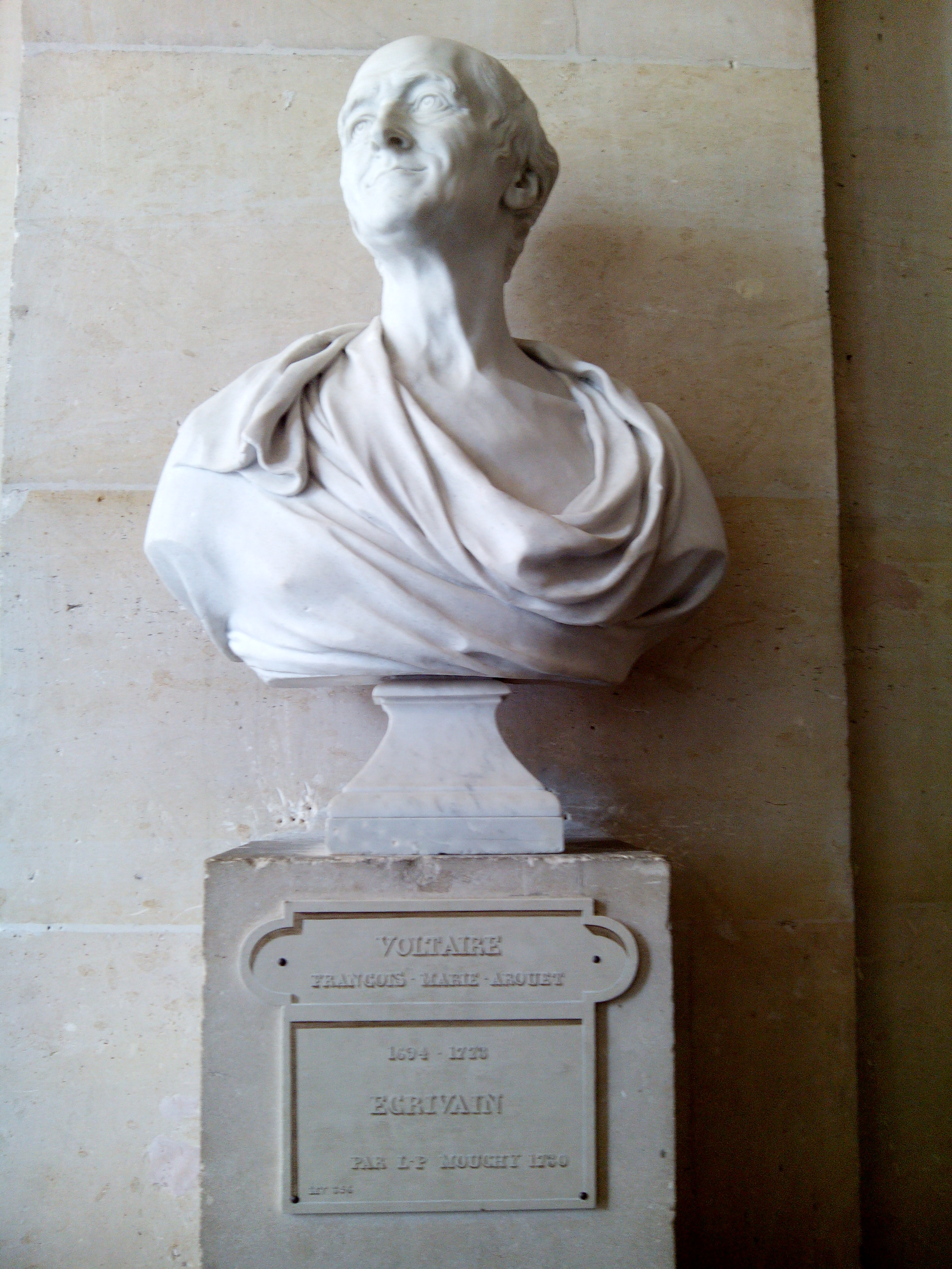 Fotografía realizada en el palacio de Versalles, agosto de 2014